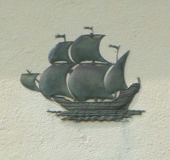 Stabilimento principe di piemonte, veliero decorativo